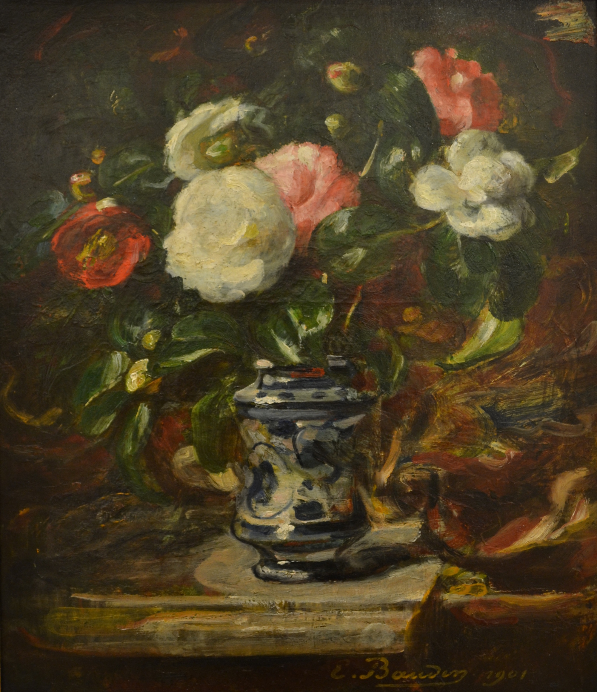 Peinture d'Eugène Baudin représentant des camélias dans un vase. Huile sur toile